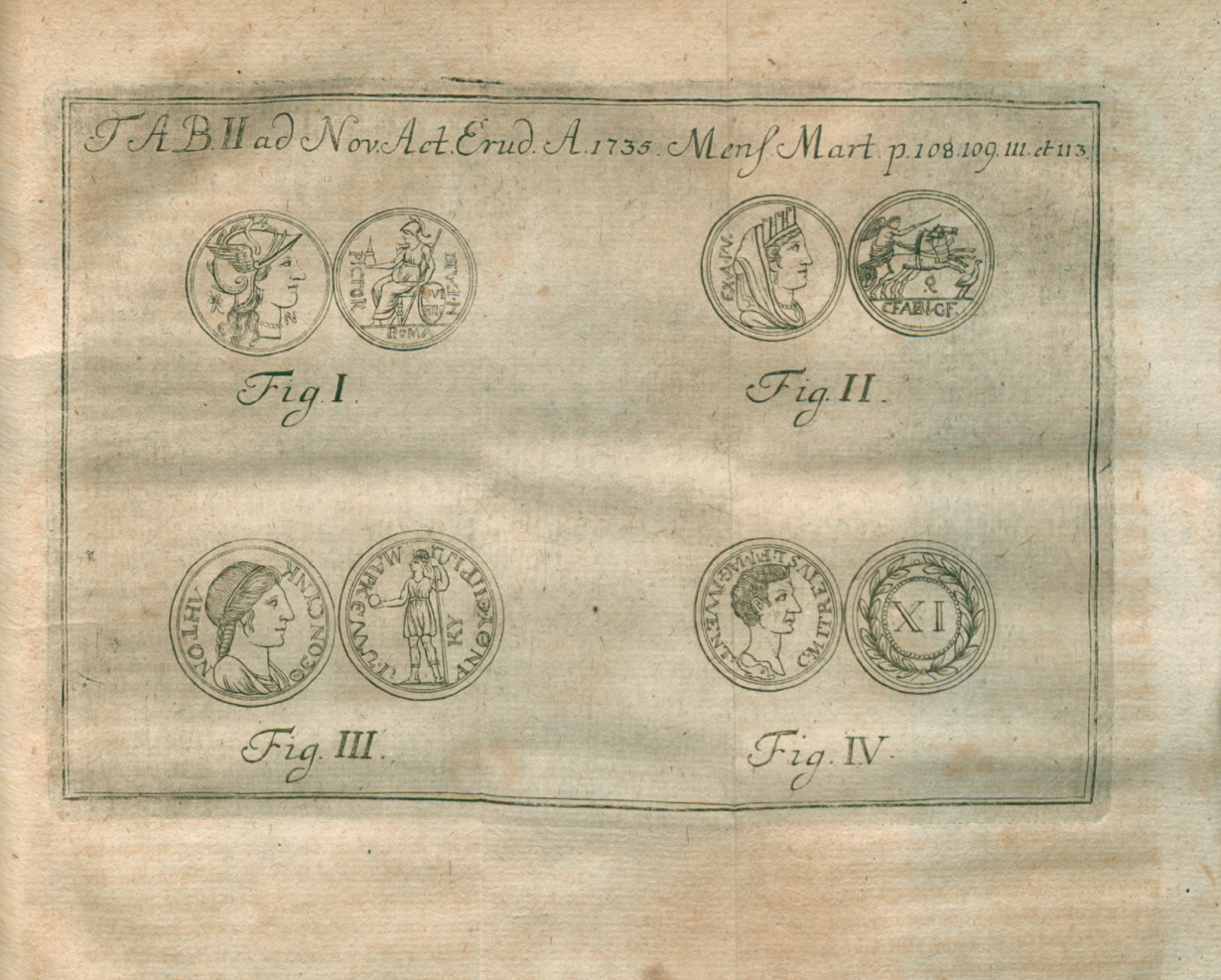 Illustration